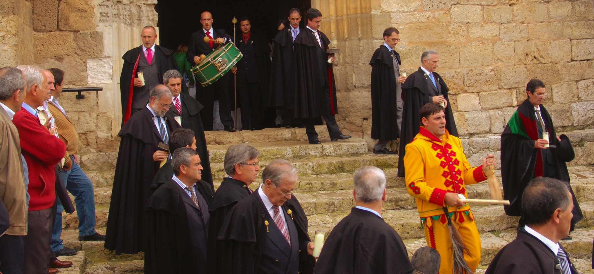 Corpus Christi, "El Colacho", Cofradía de Minerva, saliendo de la iglesia al inicio de la procesión, Castrillo de Murcia (Burgos, Castilla y León).